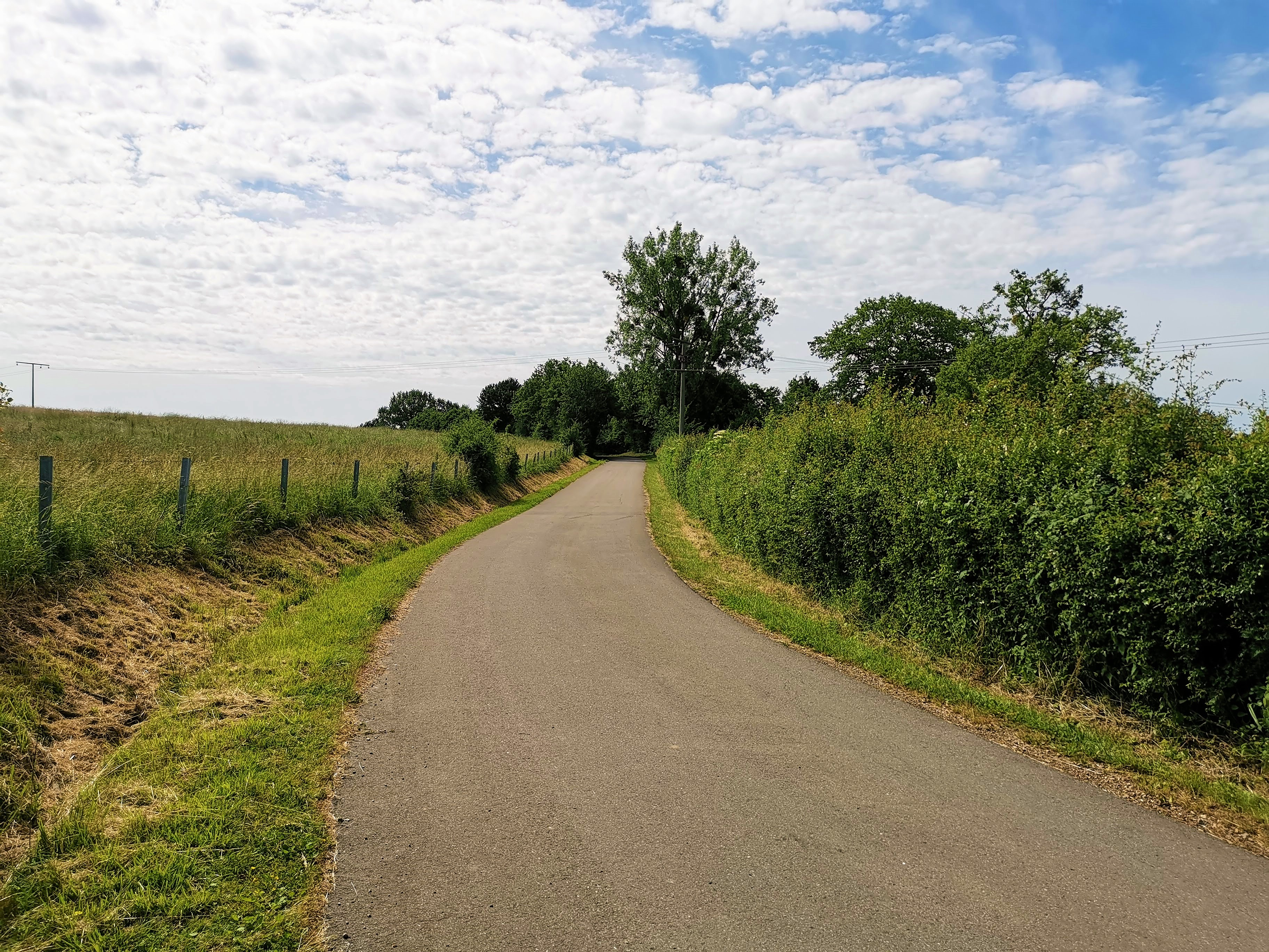 Sur l'itinéraire cyclable Charly Gaul (PC11), à l'est de Hassel. Vue en direction sud.